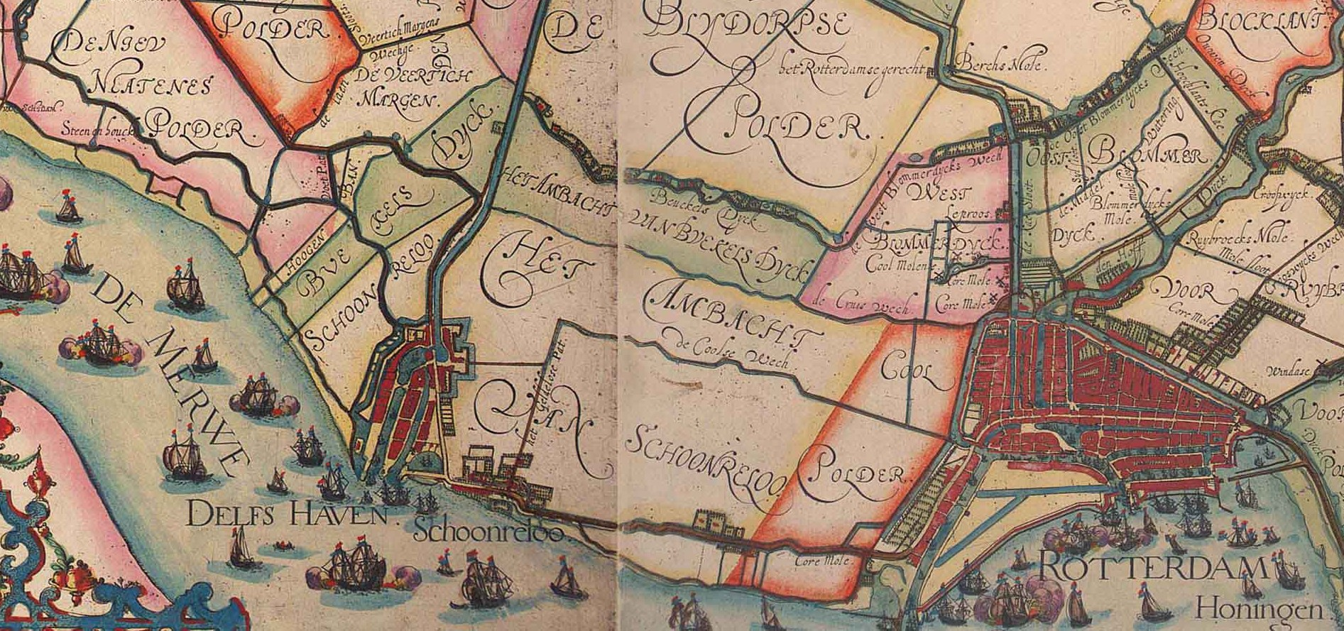 Detail uit de kaart van Schieland van 1611 van Floris Balthasarsz. van Berckenrode